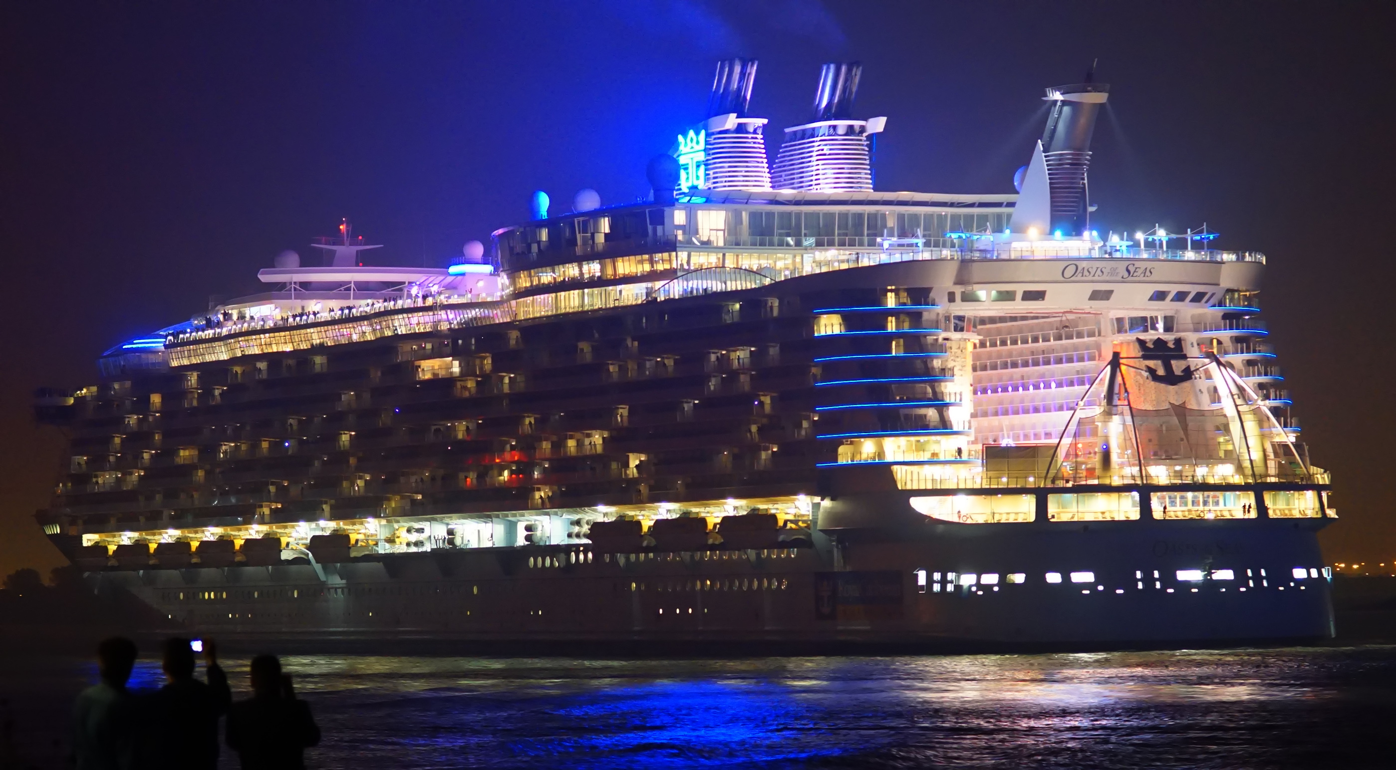 Nieuwe Waterweg Hoek van Holland 29-9-2014. Oasis of the Seas onderweg naar Rotterdam , gaat 30-9-2014 in dok bij Keppel Verolme in de Botlek.